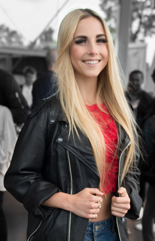 Isa Tengblad var en av artisterna för Allsång på Skansen som presenteras den 10 juni 2015 på Skansen i Stockholm.